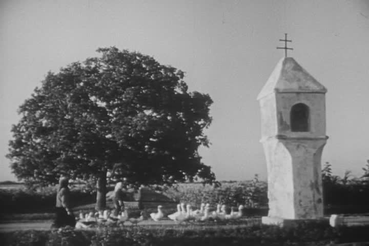 Slovenské božie muky z obce Ohrady, záber z amerického filmového týždenníka "The March of Time".